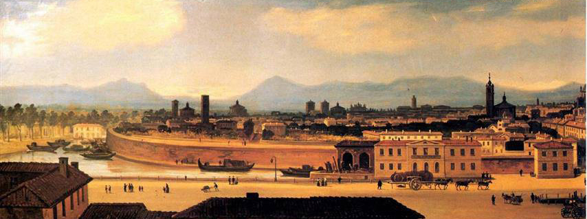 La Darsena di Milano alla fine del XIX secolo